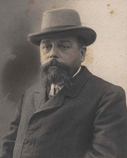 Der französische Fotograph und Verleger Alexandre Bougault (1851-1911).